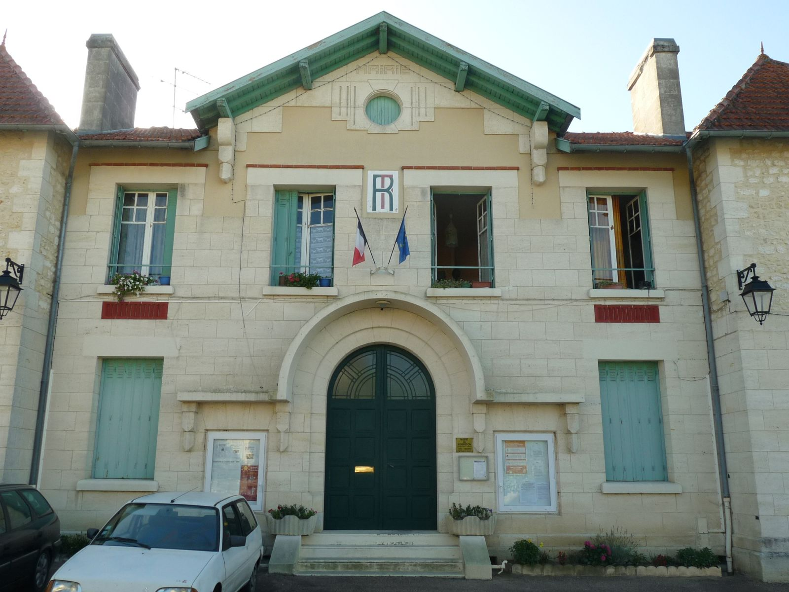 mairie de Boisredon (17), France